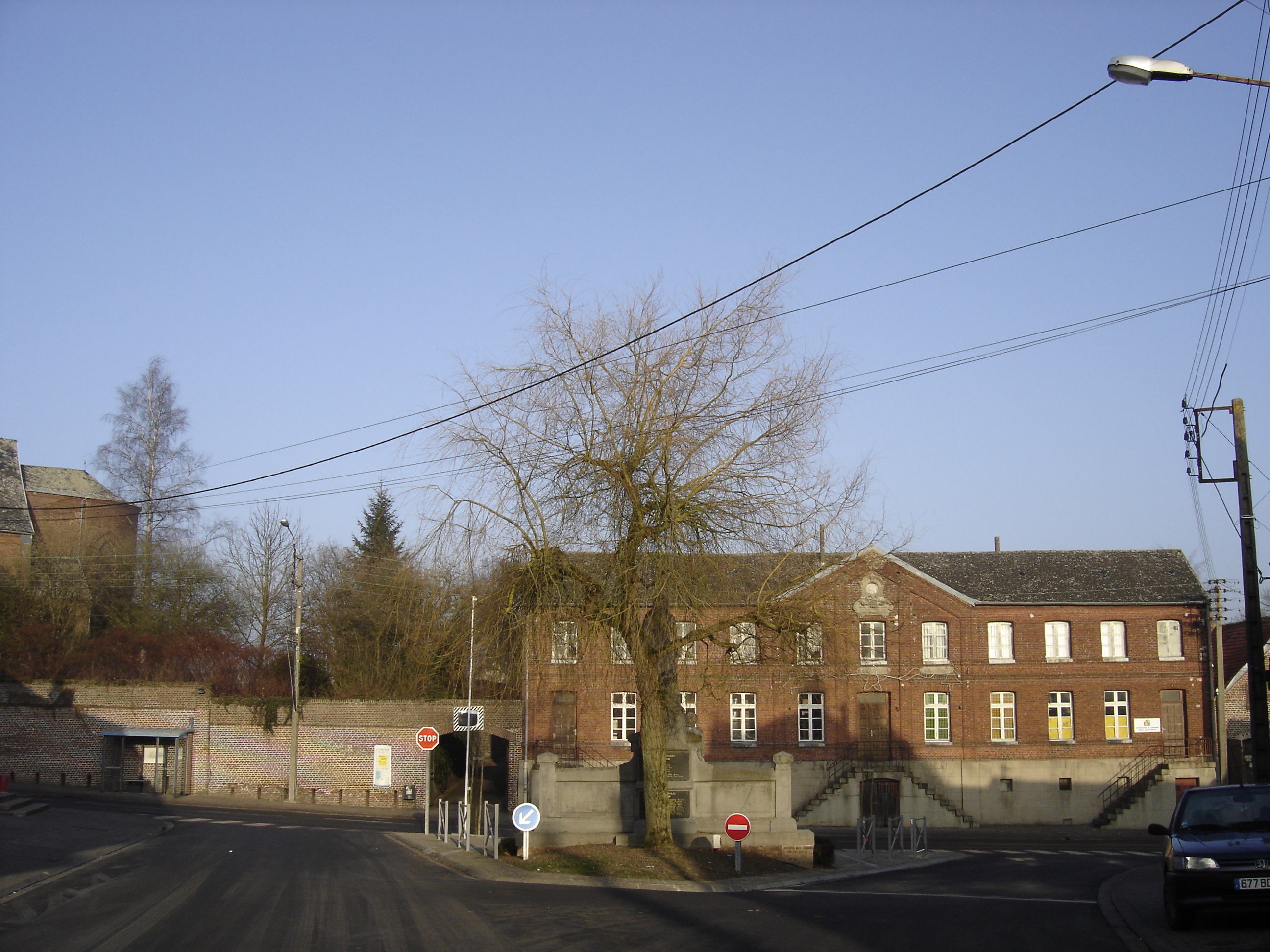 ancienne école des filles